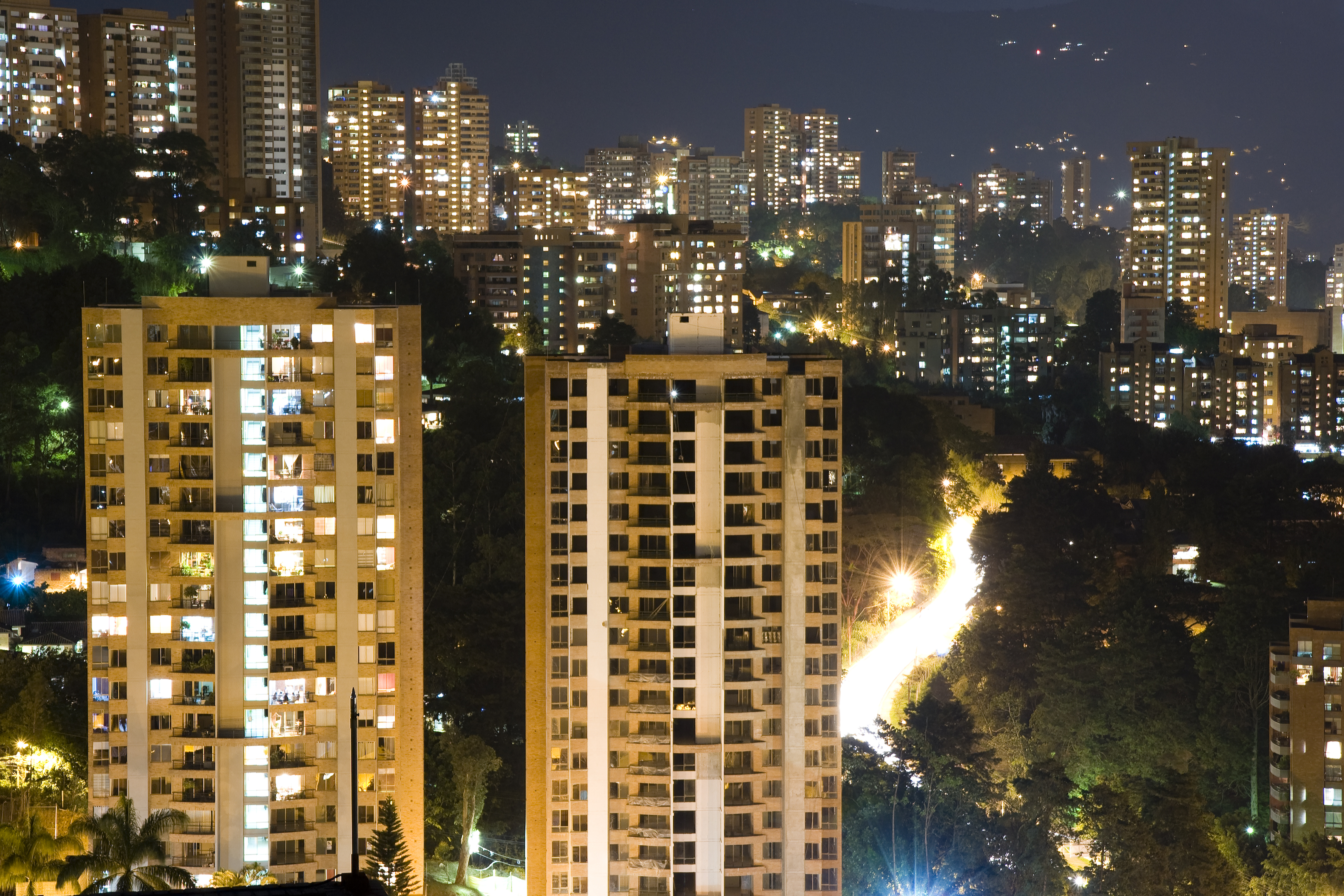 El poblado, Medellín